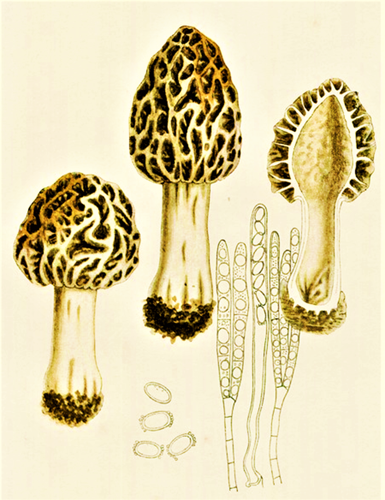 Giacomo Bresadola: Morchella vulgaris (Pers.) Gray (1821), heute Morchella esculenta (L., 1753) Pers. (1801)